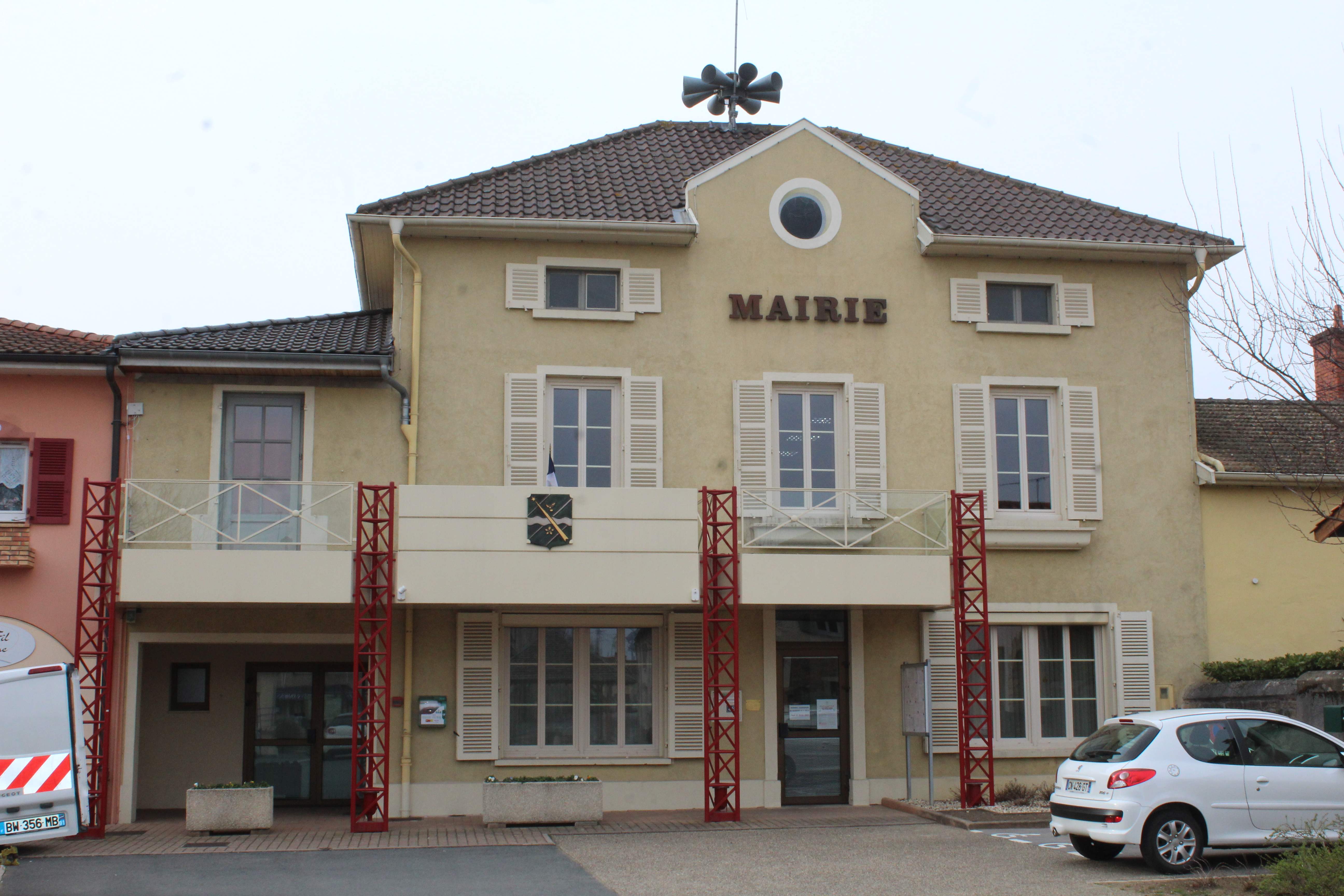 Mairie de Manziat.